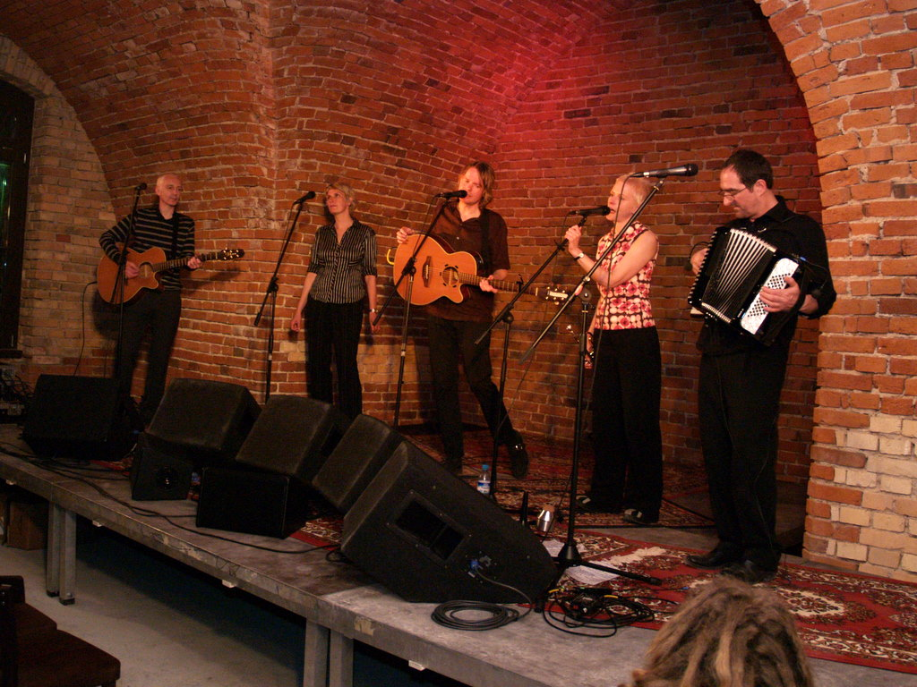 I Chumbawamba durante un concerto acustico. Fonte: Flickr Autore: Zeitfixierer